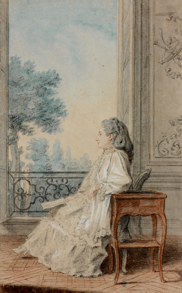 Elisabeth Josèphe de La Borde, baronne de Marchais puis comtesse d'Angivillier par Louis Carrogis dit CARMONTELLE. Collection particulière.